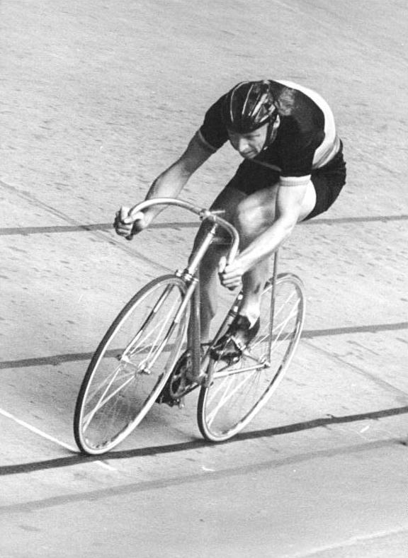 Thomas Huschke ADN-ZB Gahlbeck 21-8-75 Lüttich: Weltmeisterschaften 1975 im Bahnradsport - Der Berliner TSC-Fahrer Thomas Huschke (Foto von einem früheren Wettkampf) erreichte am 21.8.75 das Finale im 4000-m-Verfolgungsfahren. Als WM-Dritter des Vorjahres hat er sich damit bereits die Silbermedaille erkämpft. Thomas Nuschke bezwang im Halbfinallauf seinen polnischen Konkurrenten Jan Jankiewicz und trifft im Endlauf (am Abend des 21.8.75) auf den Favoriten dieser Disziplin, Wladimir Osekin (UdSSR).